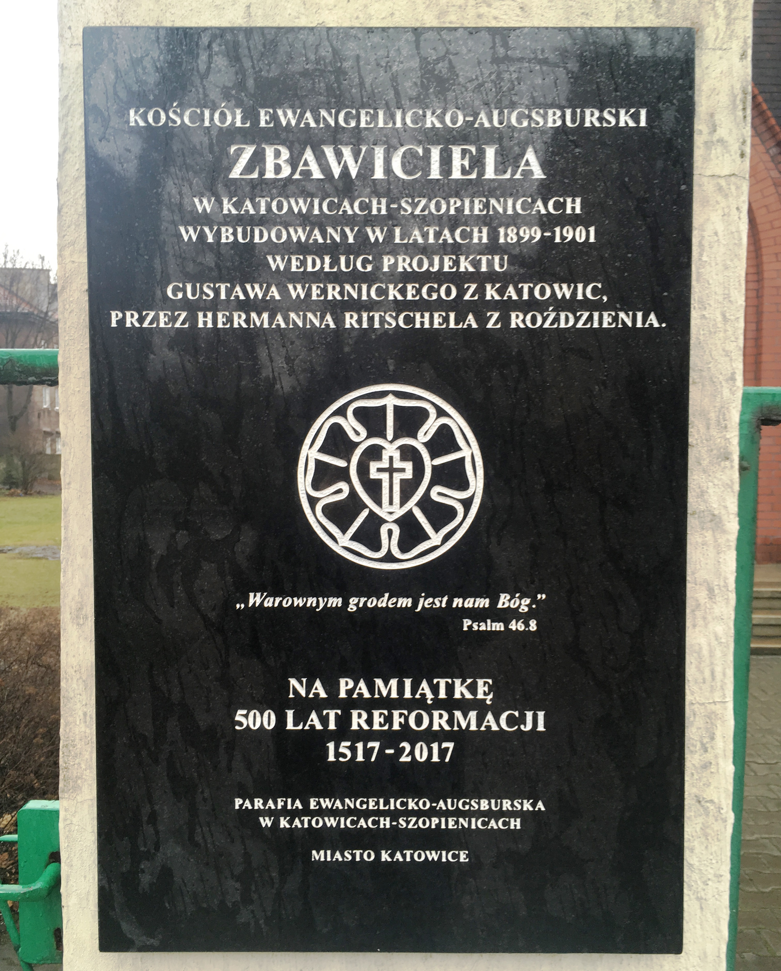 Tablica pamiątkowa przed wejściem do kościoła ewangelisko-augsburskiego w Katowicach-Szopienicach przy ul. ks. bpa Herberta Bednorza 20. Tablica zamontowana 23 grudnia 2017 roku.